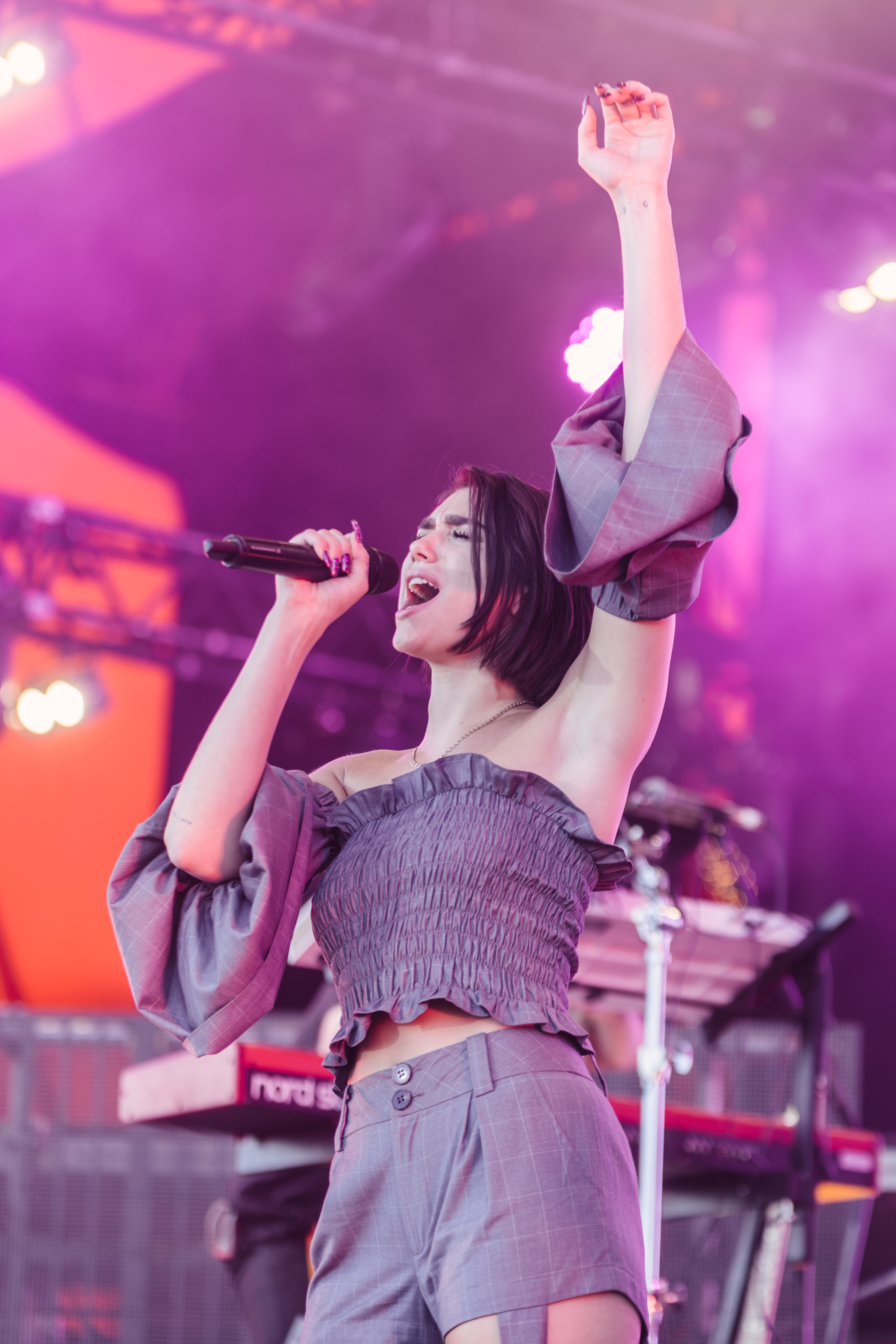 Festivalsommer This photo was created with the support of donations to Wikimedia Deutschland in the context of the CPB project "Festival Summer".